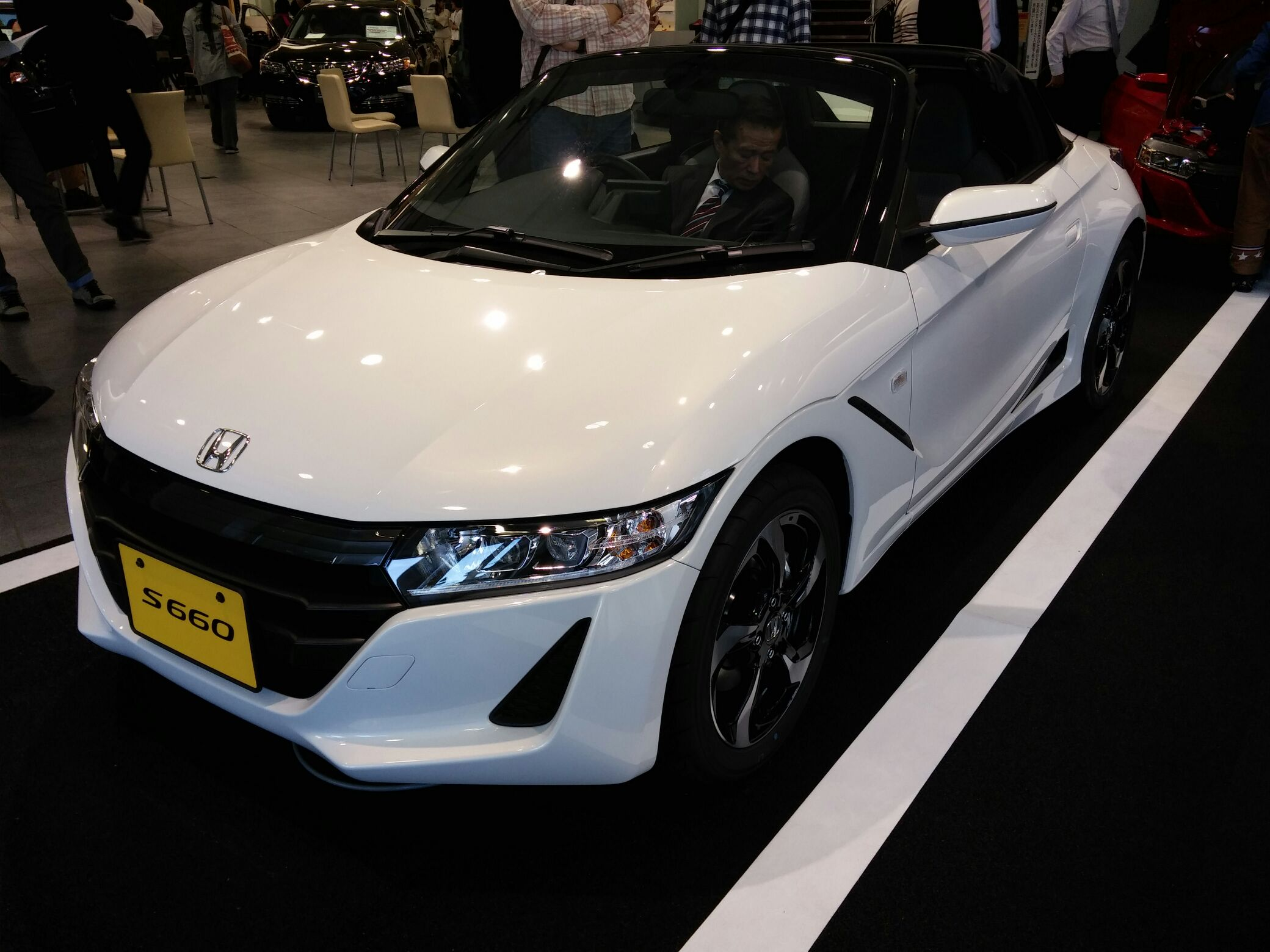 ホンダ・S660